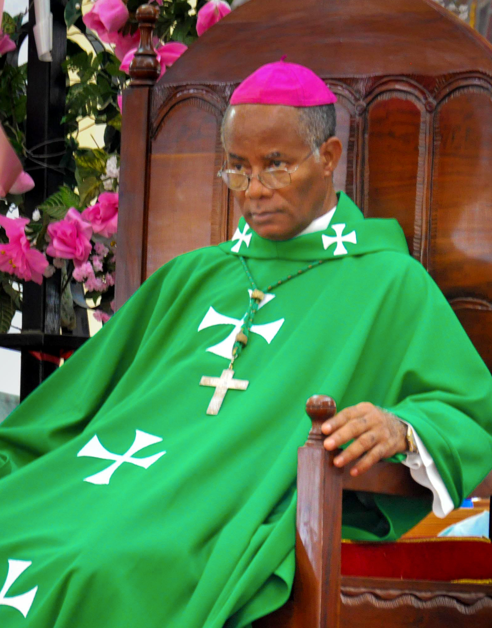 Joseph Serge Miot, archevêque de Port-au-Prince de 2008 à 2010.